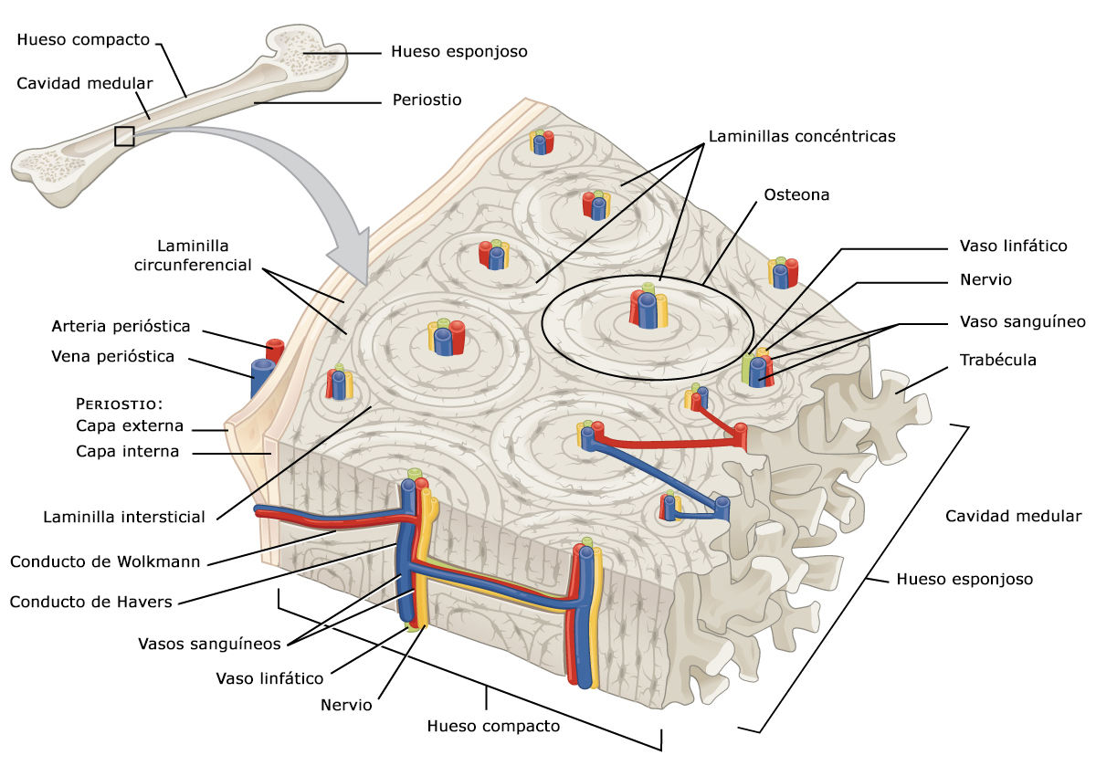 Esquema en el que se muestra la estructura histológica del hueso compacto.